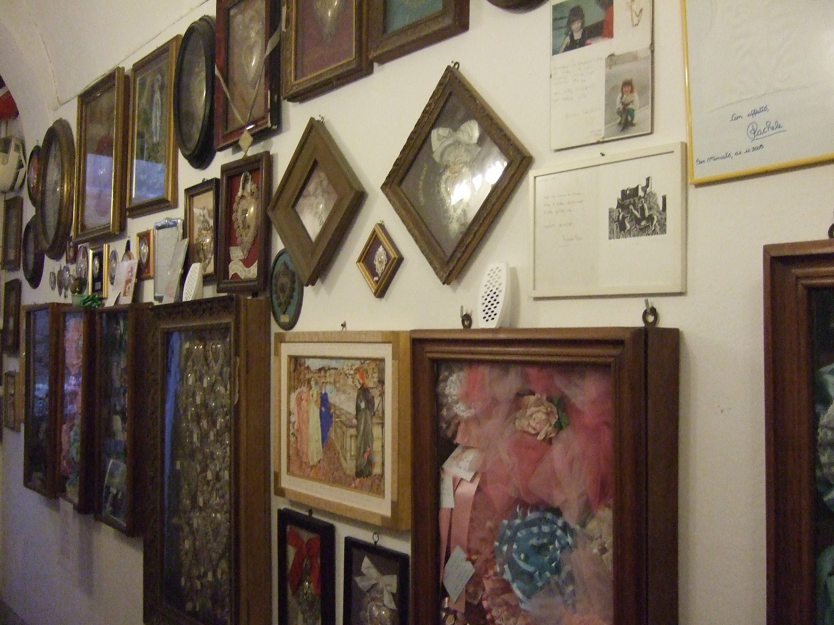 Santuario Madre dei Bimbi Cigoli interno